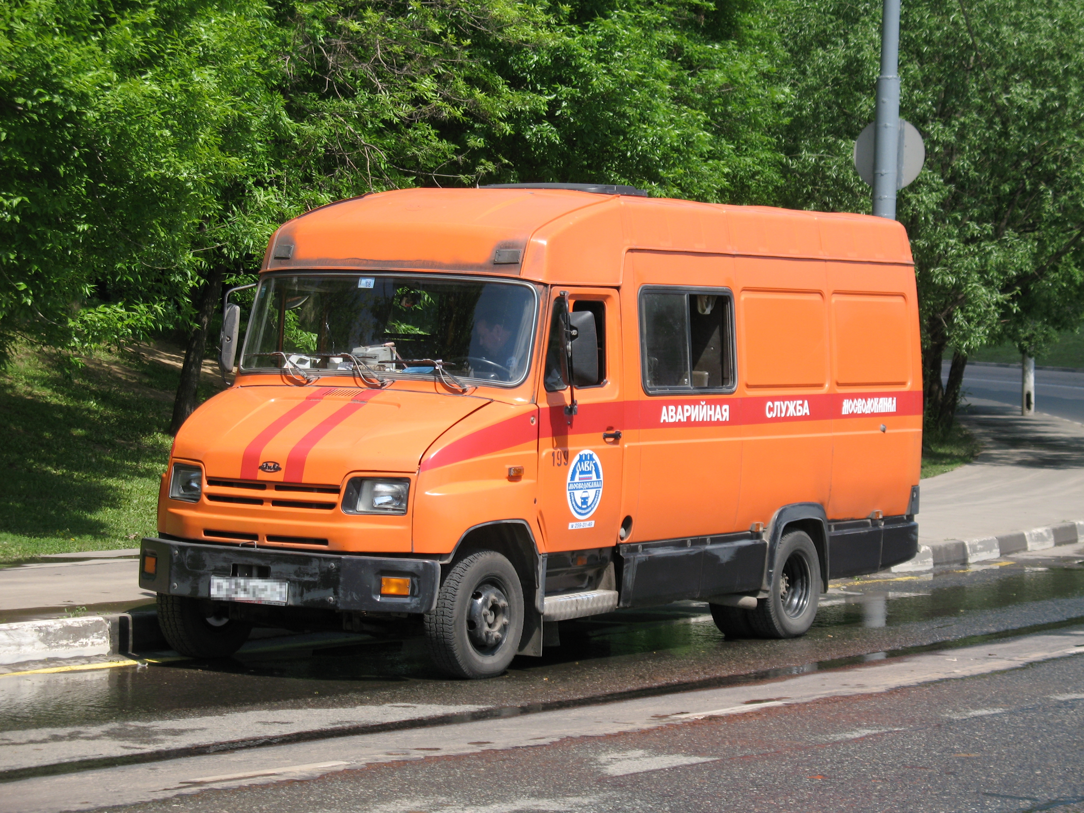 Фургон ЗИЛ-5301Р1 (5301СС)